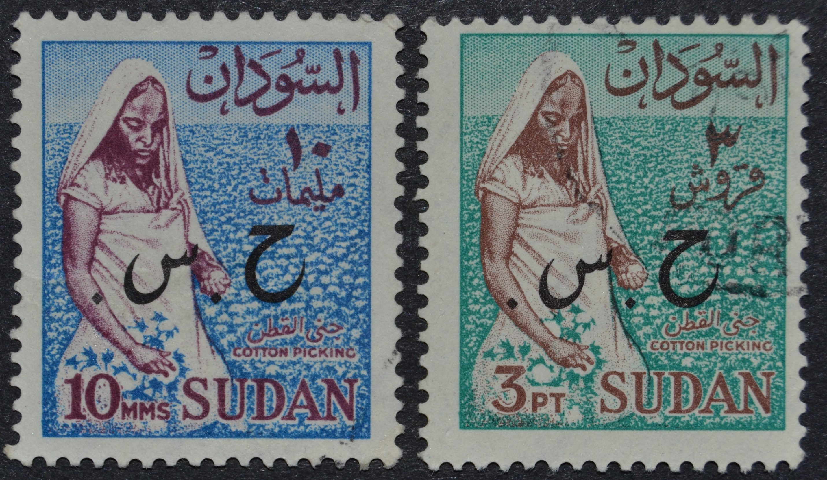 2 selos do Sudão, da série "Cotton picking" (apanha do algodão), emitidos em 1962.